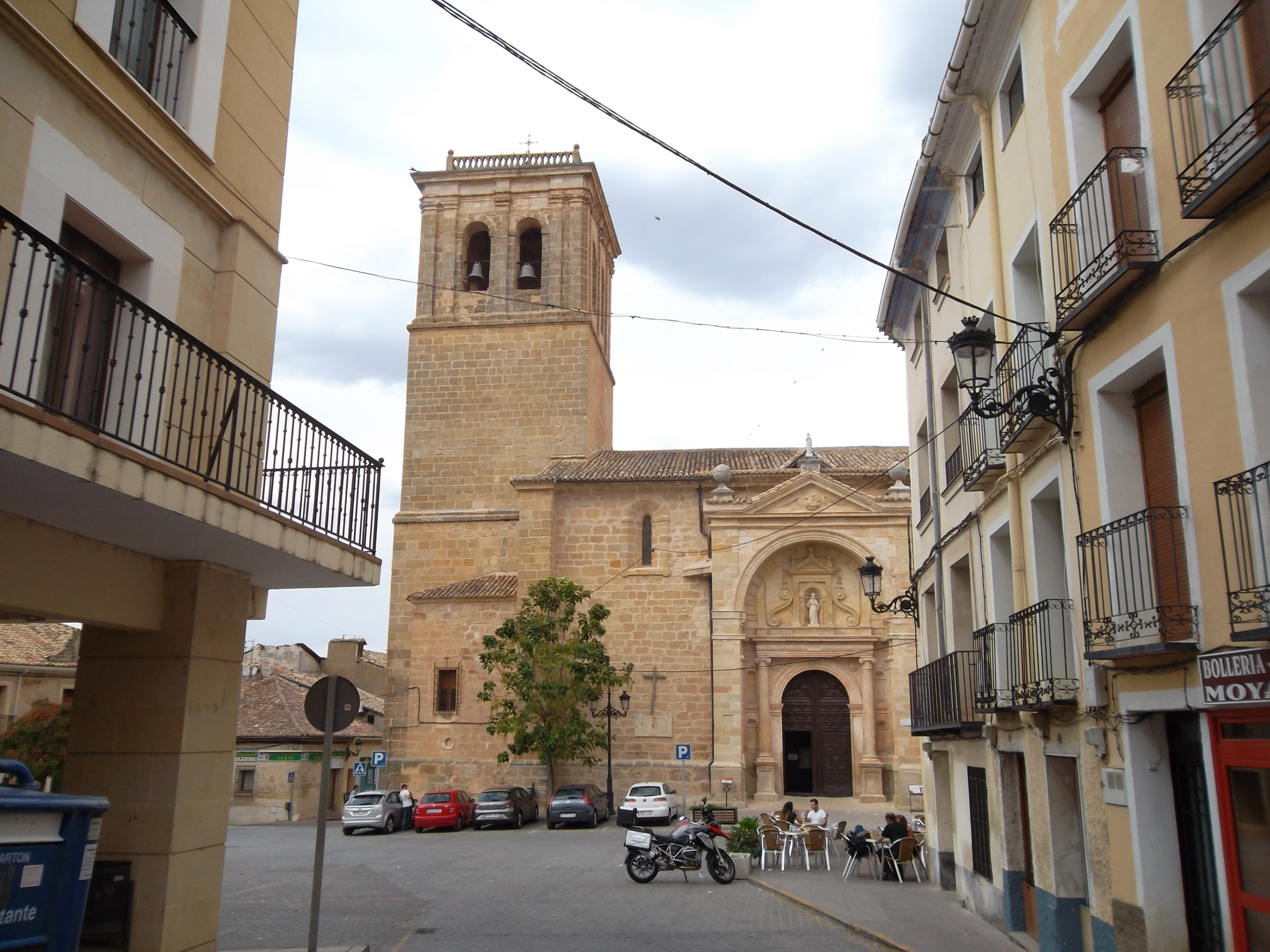 Iglesia de la Asuncion de Sacedón, en Guadalajara, España.